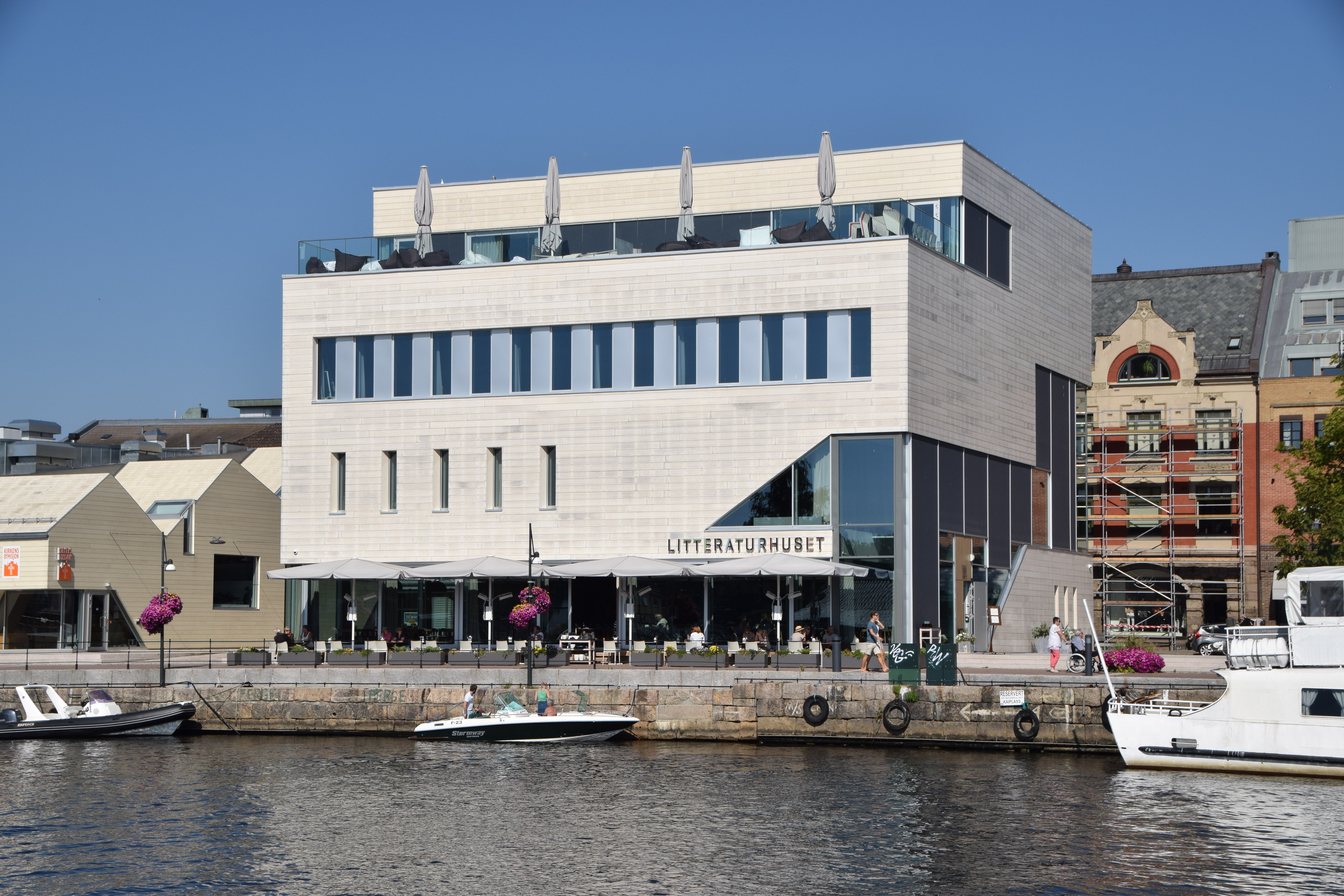 Litteraturhuset i Fredrikstad sett fra Kråkerøy